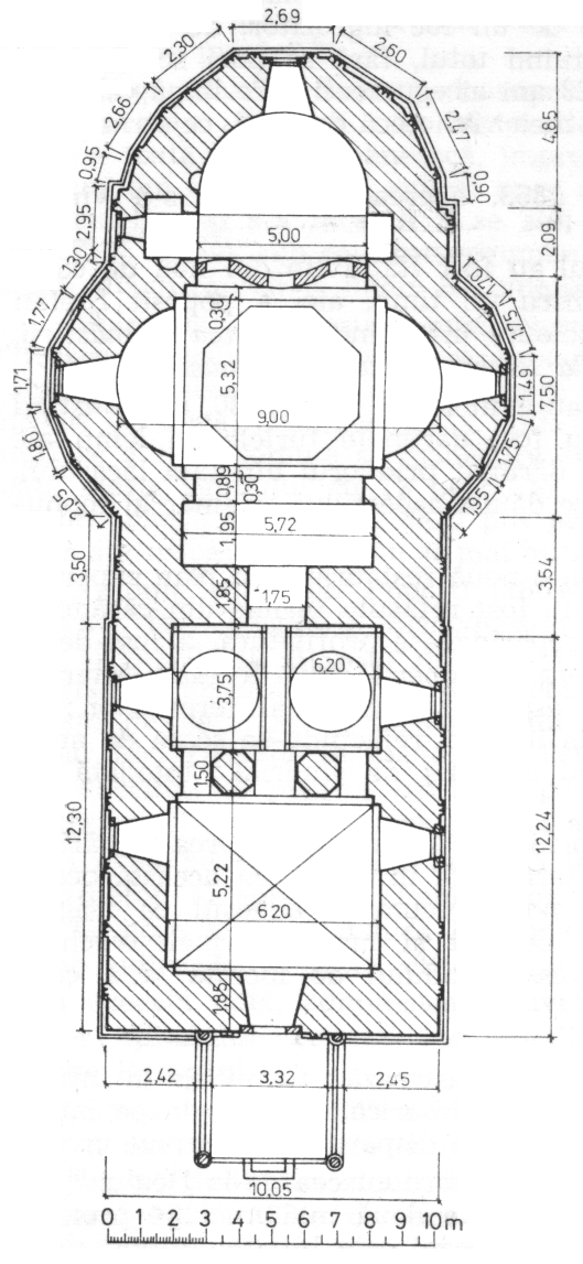 Planul bisericii mănăstirii Brebu 01